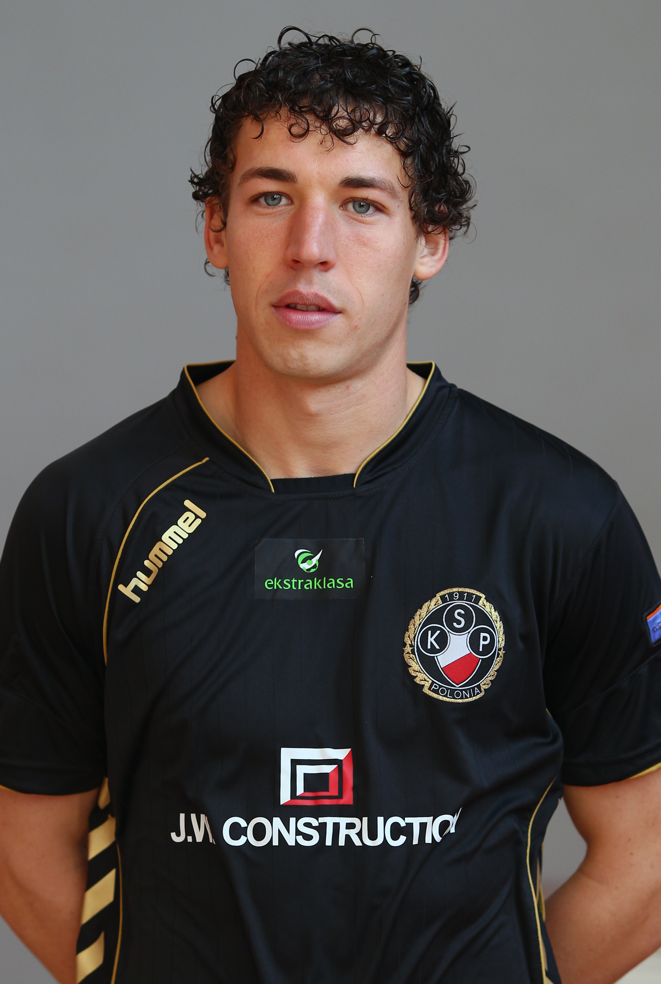 Jakub Tosik, player of Polonia Warszawa (2011)